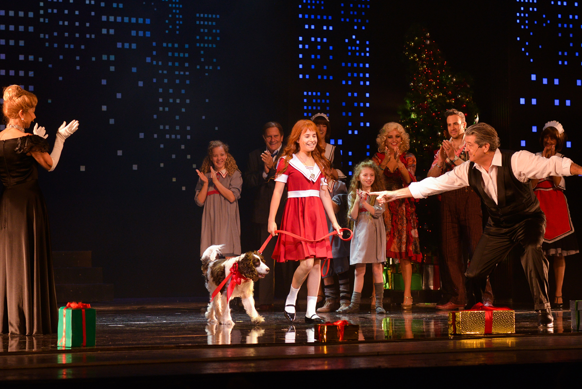 שי הראל בתפקיד אנני מתוך המחזמר בהופעתו במשכן האופרה